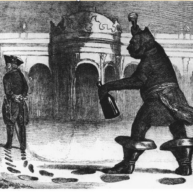 Karikatur auf Friedrich Wilhelm IV., der als sekttrinkender Gestiefelter Kater vergebens versucht, dem Beispiel Friedrichs des Großen zu folgen